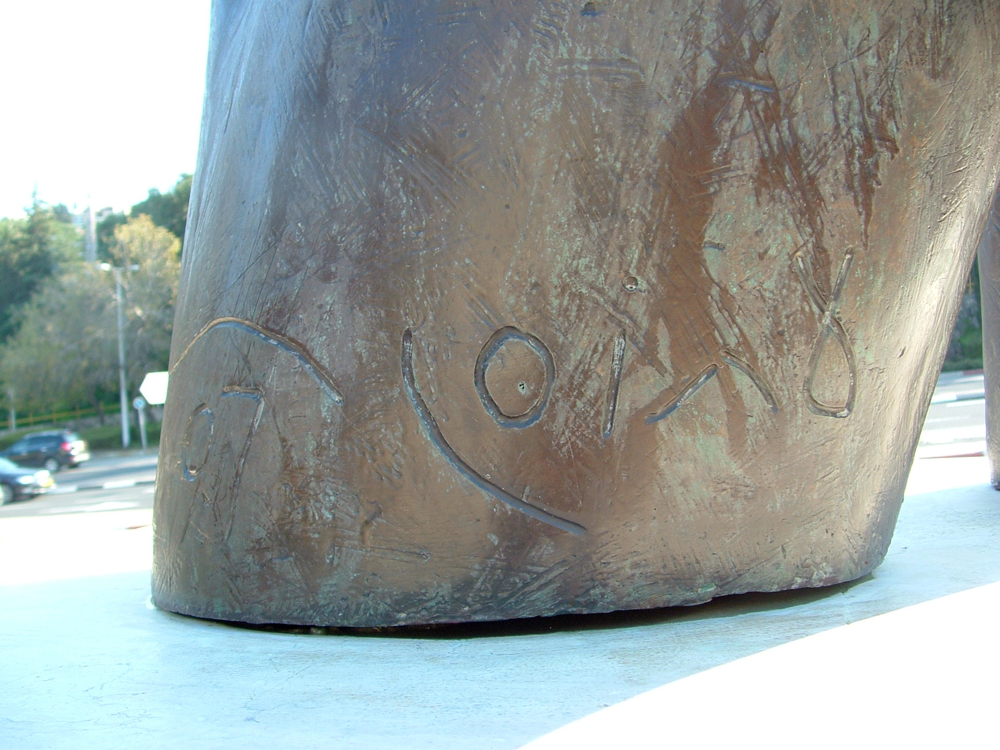 The statue - Winged Lion. It was sculptured by Amos Kenan. In front of the Sport Center- Haifa, Israel הפסל "אריה מכונף". הפסל הוא עמוס קינן. הפסל הוצב בחזית היכל הספורט בשכונת רוממה בחיפה